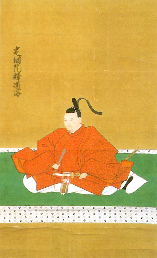 渡辺定綱の肖像。